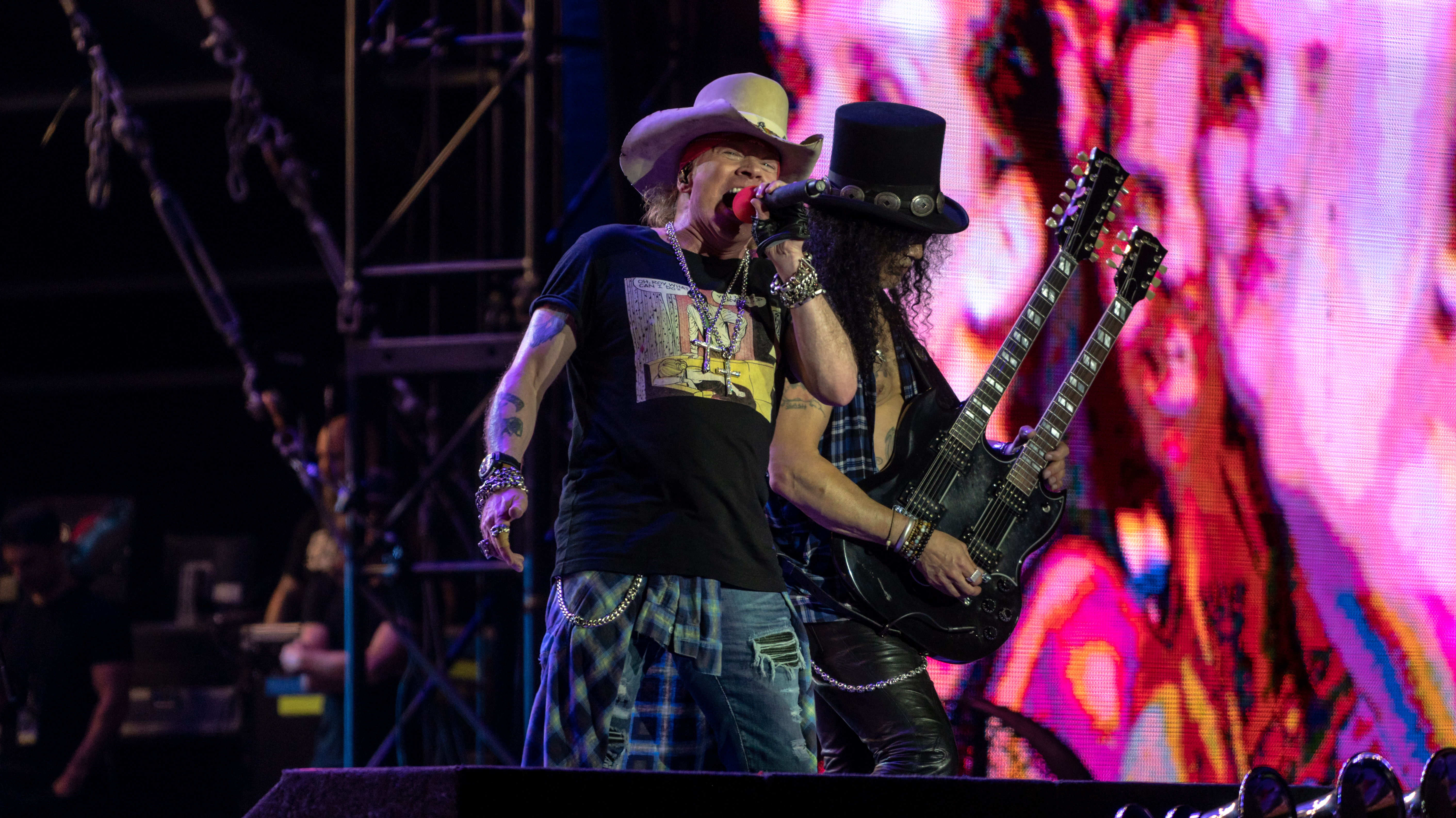 GNRChorzow090718-95